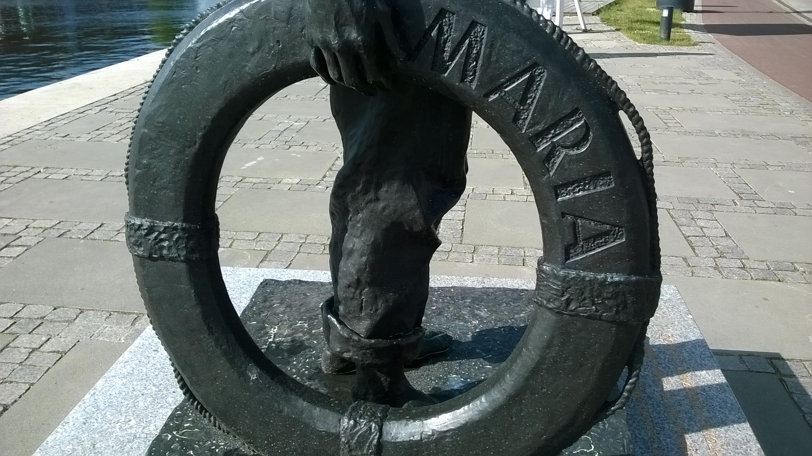 Fragment rzeźby przy Alei Żeglarzy w Szczecinie - kpt. Ludomir Mączka z kołem ratunkowym swojego jachtu SY Maria